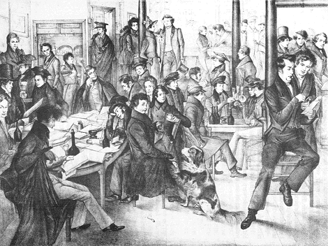 Studenten Sociëteit Minerva ± 1830. Geheel rechts, achter de man op de stoel (Willem Veder) staat Van de Linde met snuifdoos in de hand. Geheel links met hoge hoed: Aart Veder.